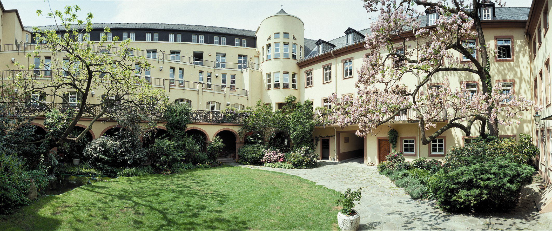 Schott-Verlagssitz Weihergarten, vom Hinterhof aus mit Blick in Richtung Weißliliengasse, Mainz